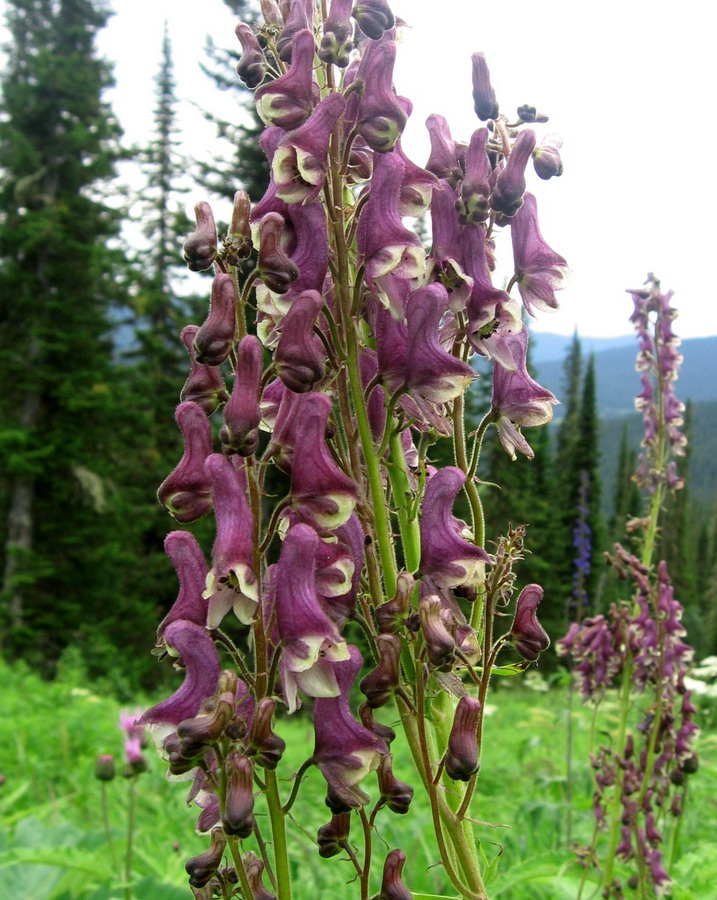 Соцветие борца белоустного (Aconitum leucostomum). Западный Саян, парк "Ергаки".